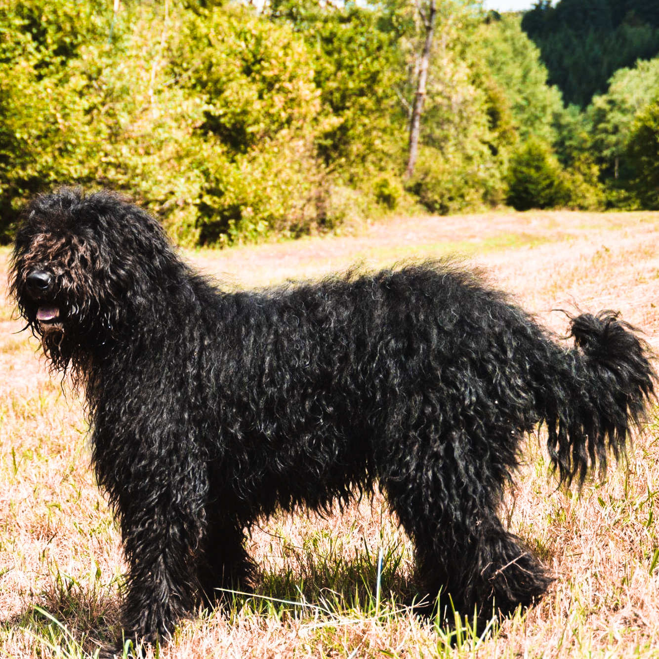 Poldi, mein schöner Strobel (Altdeutscher Hütehund)